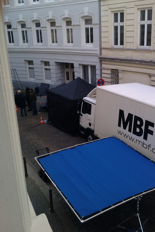 Dreharbeiten für einen Werbespot "Knut" des Möbelkonzerns Ikea in der Brüderstraße 1, Hamburg (01.12.2010)